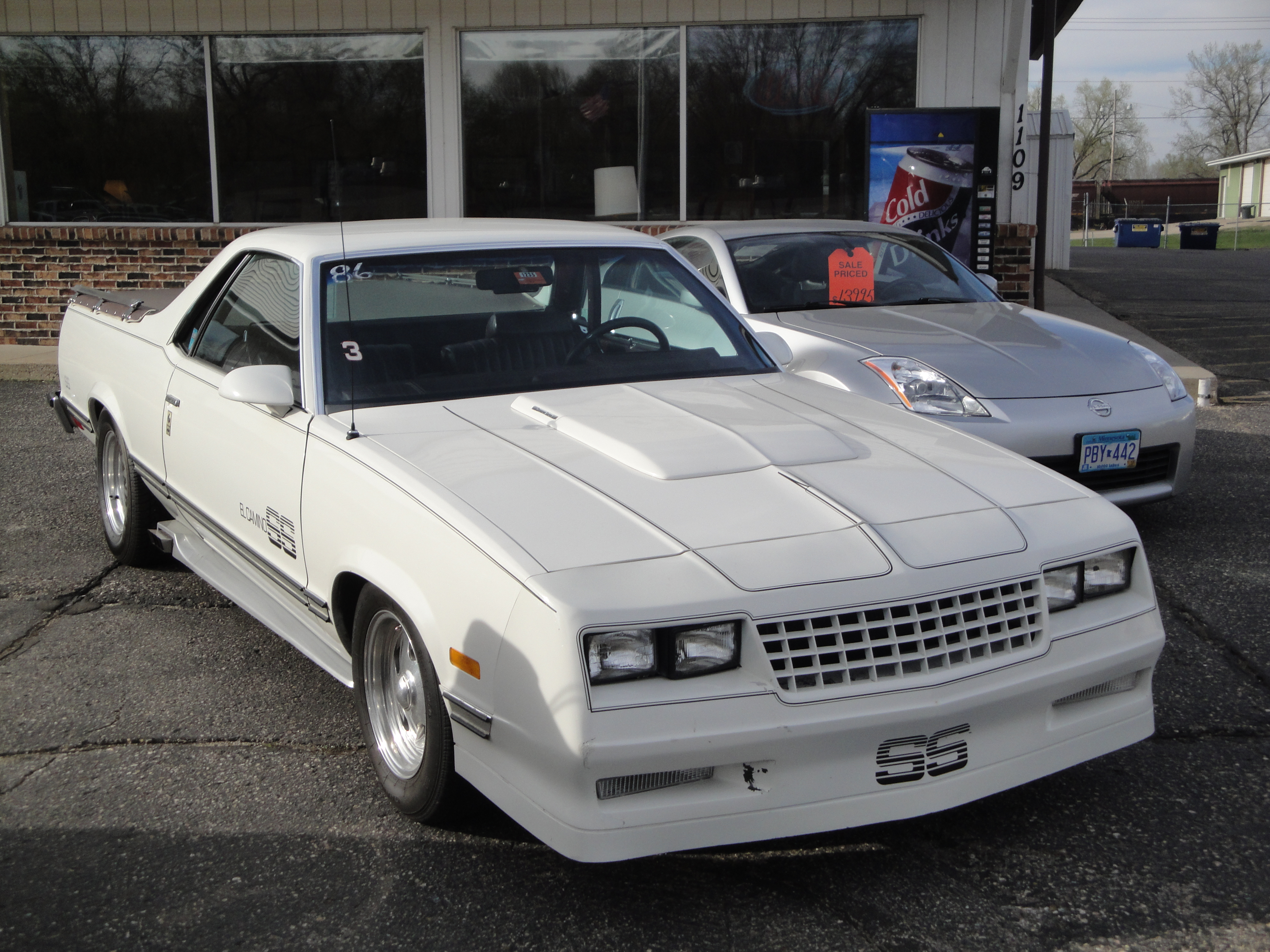 86 Chevrolet El Camino SS